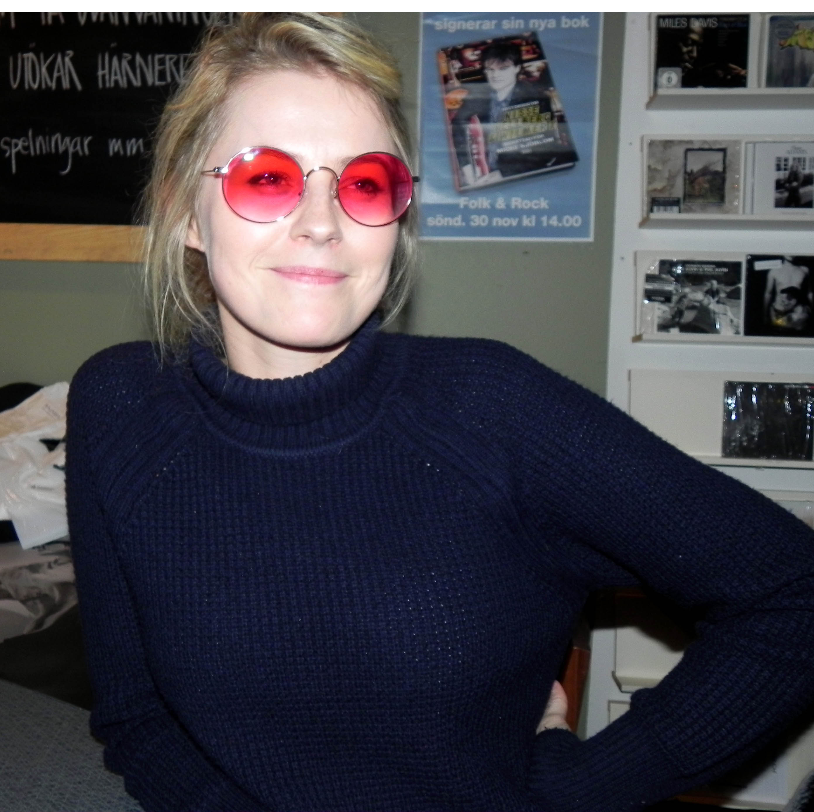 Edda Magnason signerar sin senaste skiva "Woman Travels Alone"